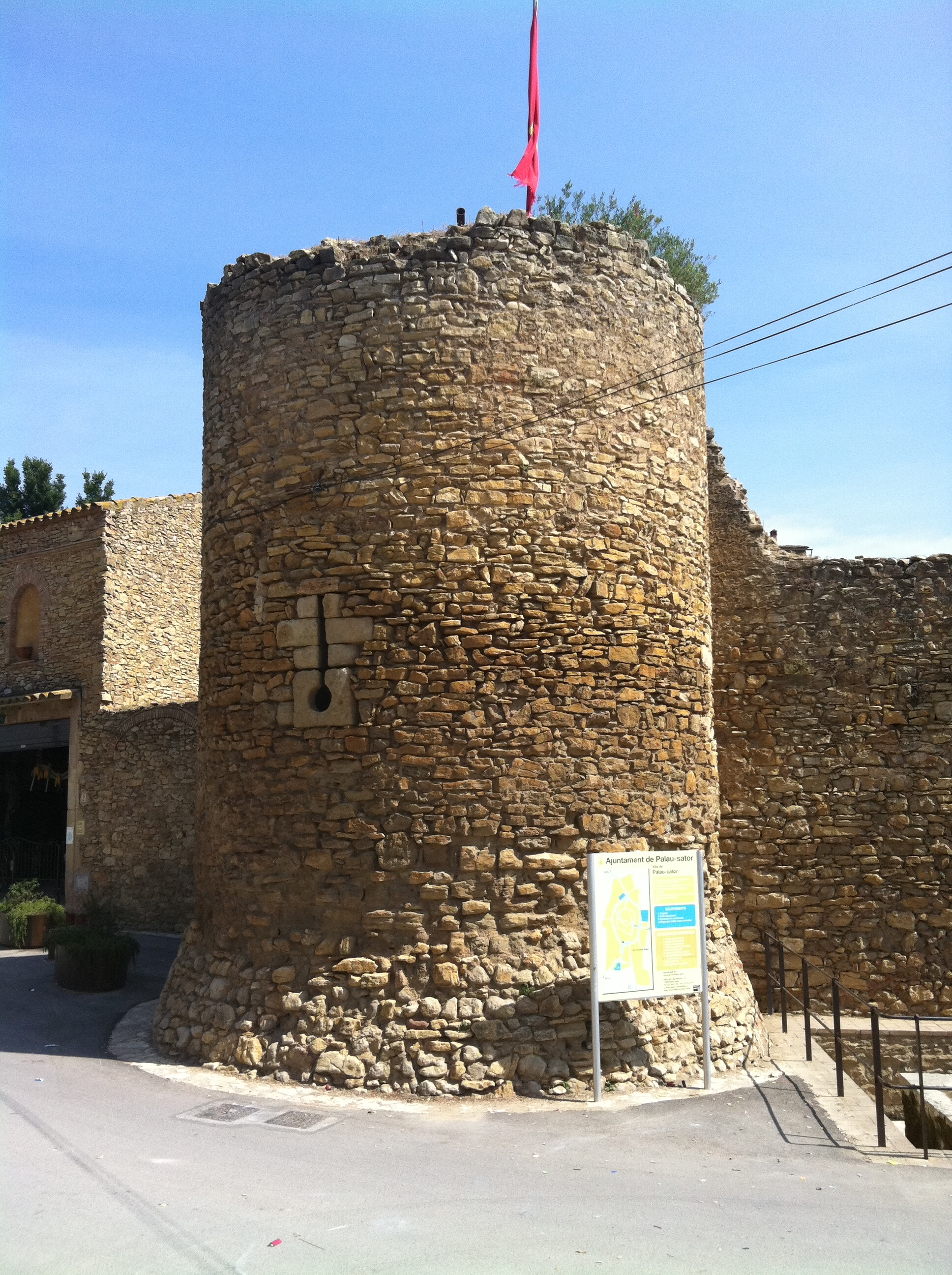 Torre Cilíndrica a Pantaleu